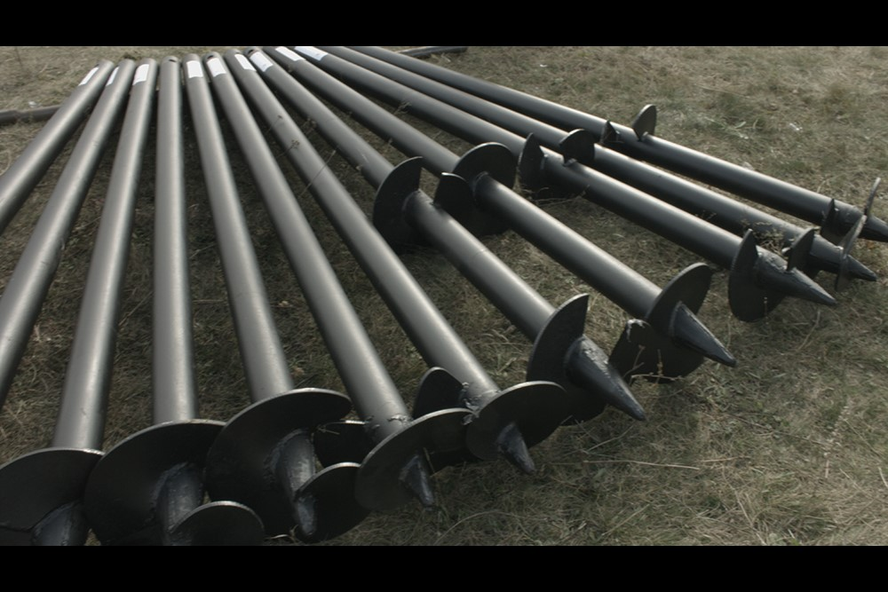 Основные модификации винтовых свай